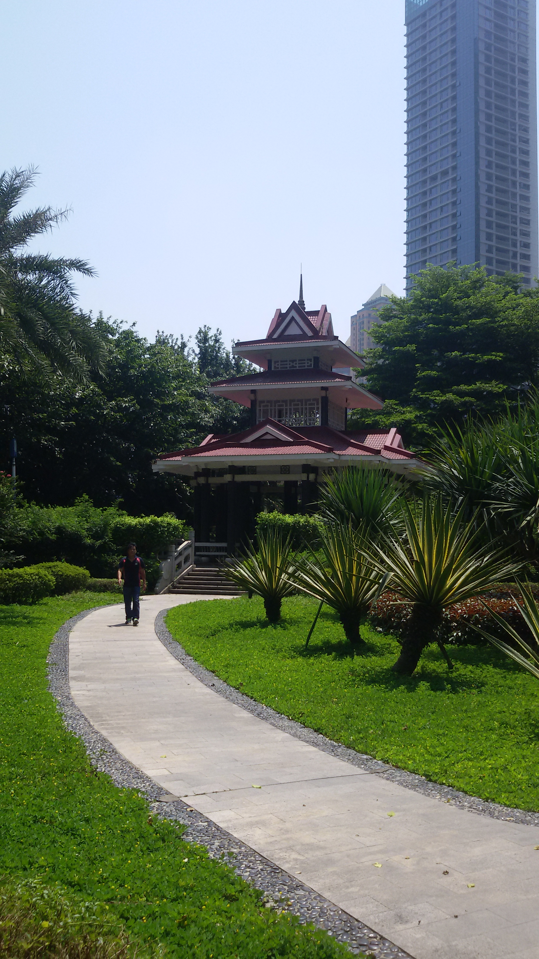 粵語: 海印公園東邊嘅休息亭